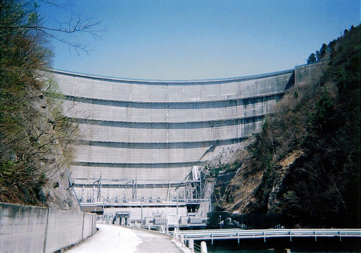 Dam